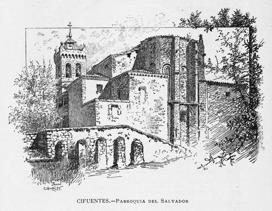 Parroquia del Salvador, en Cifuentes.